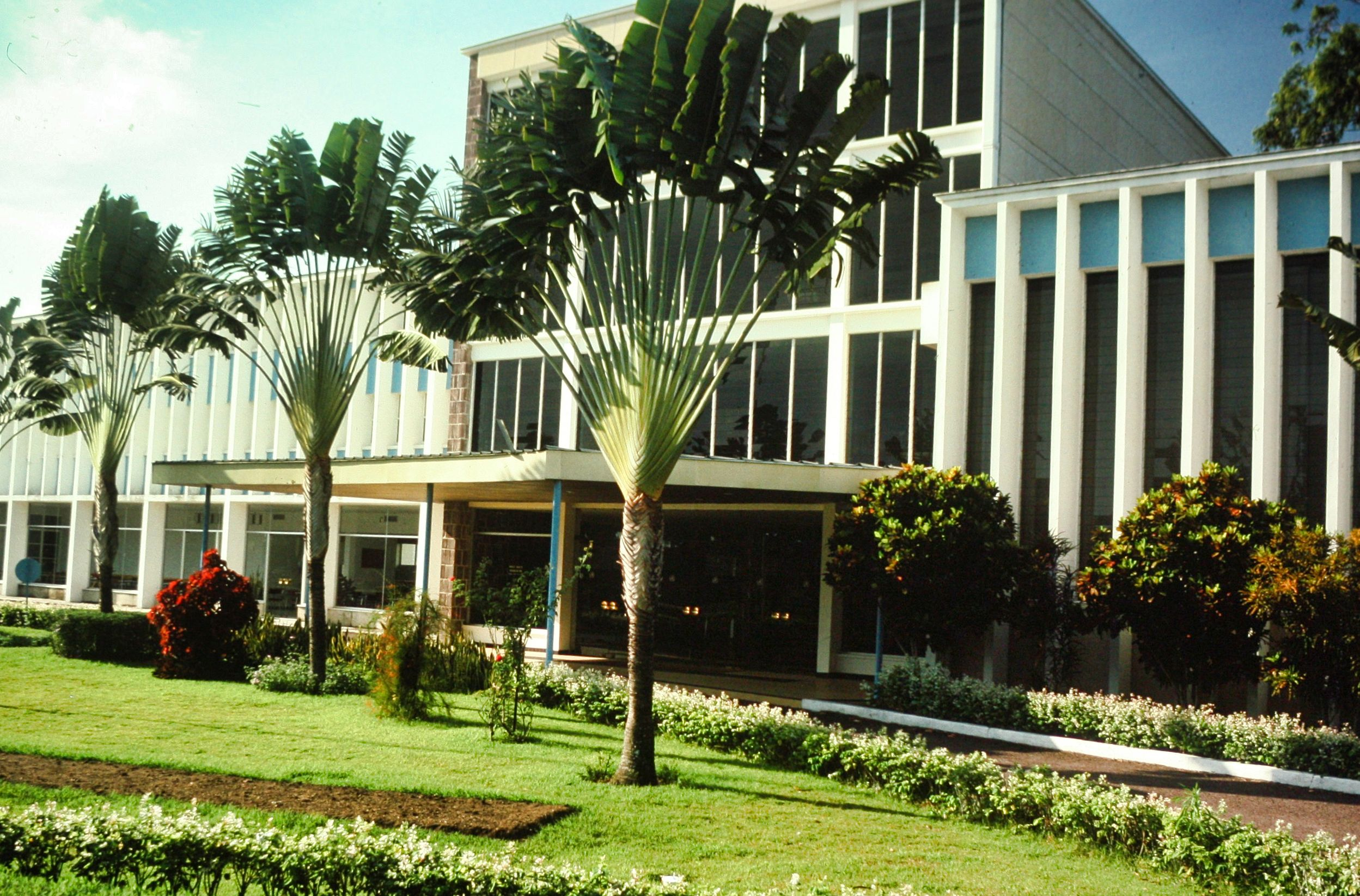 Biuro Regionalne Swiatowej Organizacji Zdrowia dla Afryki, Brazzaville, 1972